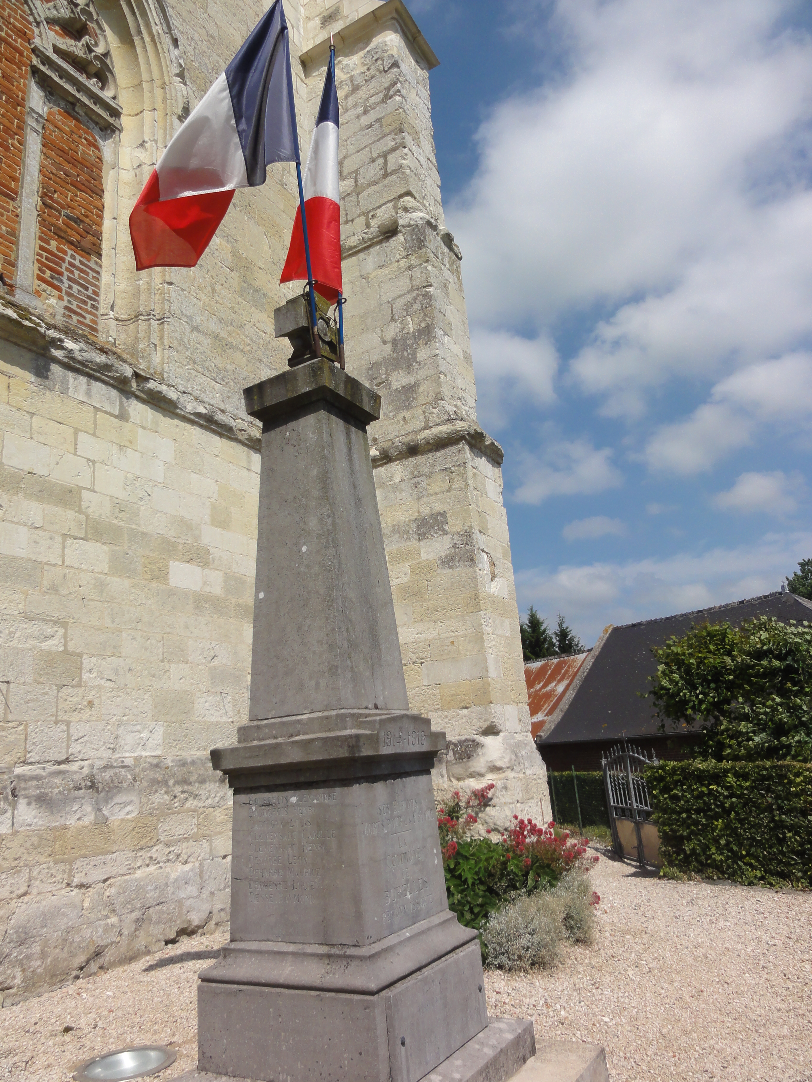 Burelles (Aisne) monument aux morts